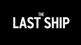 Logo de la série télévisée The Last Ship